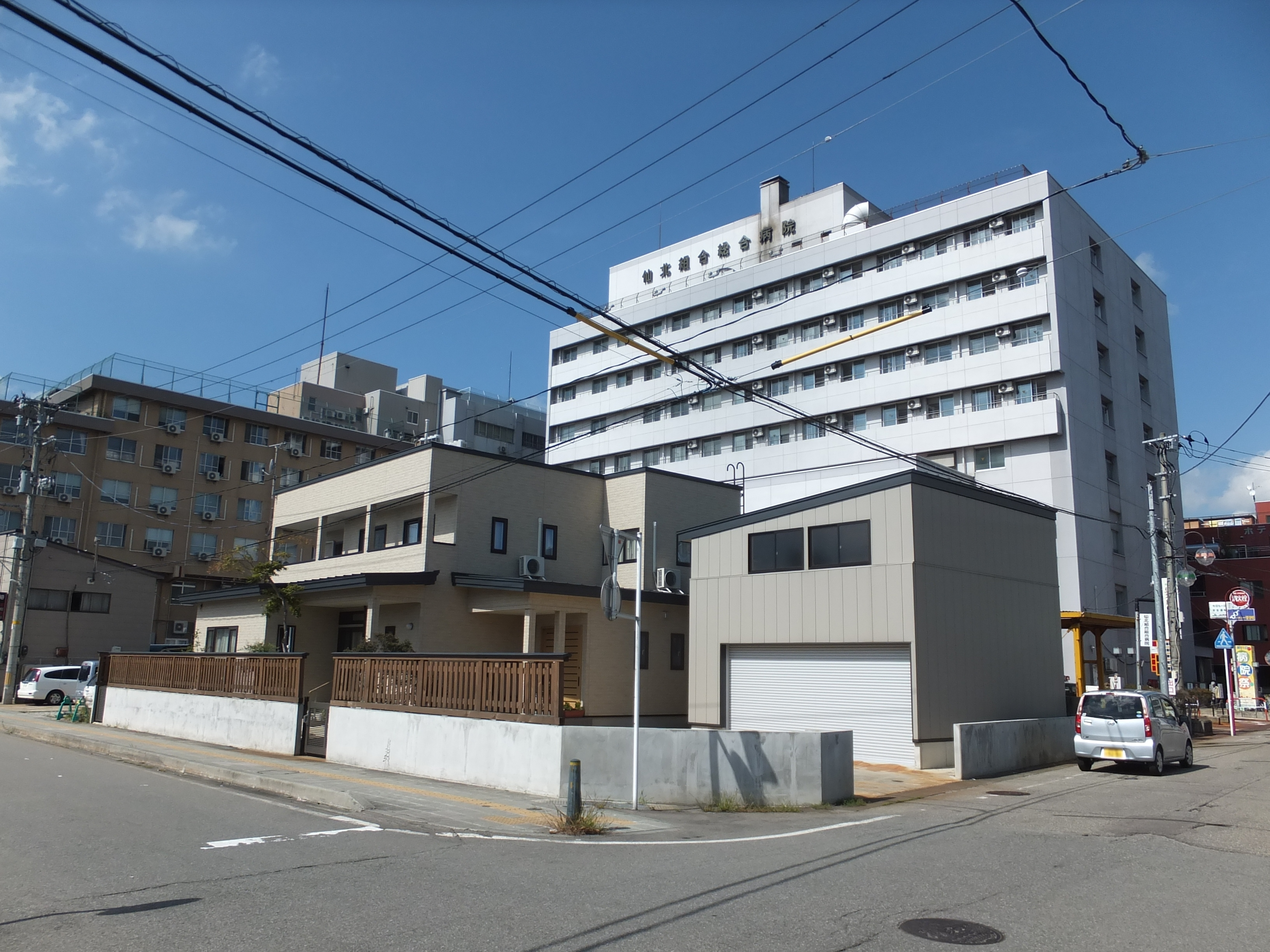 仙北組合総合病院。大曲駅前の大仙市中心部に位置する。2014年5月1日、新病棟に移転し、「大曲厚生医療センター」へと改称予定。